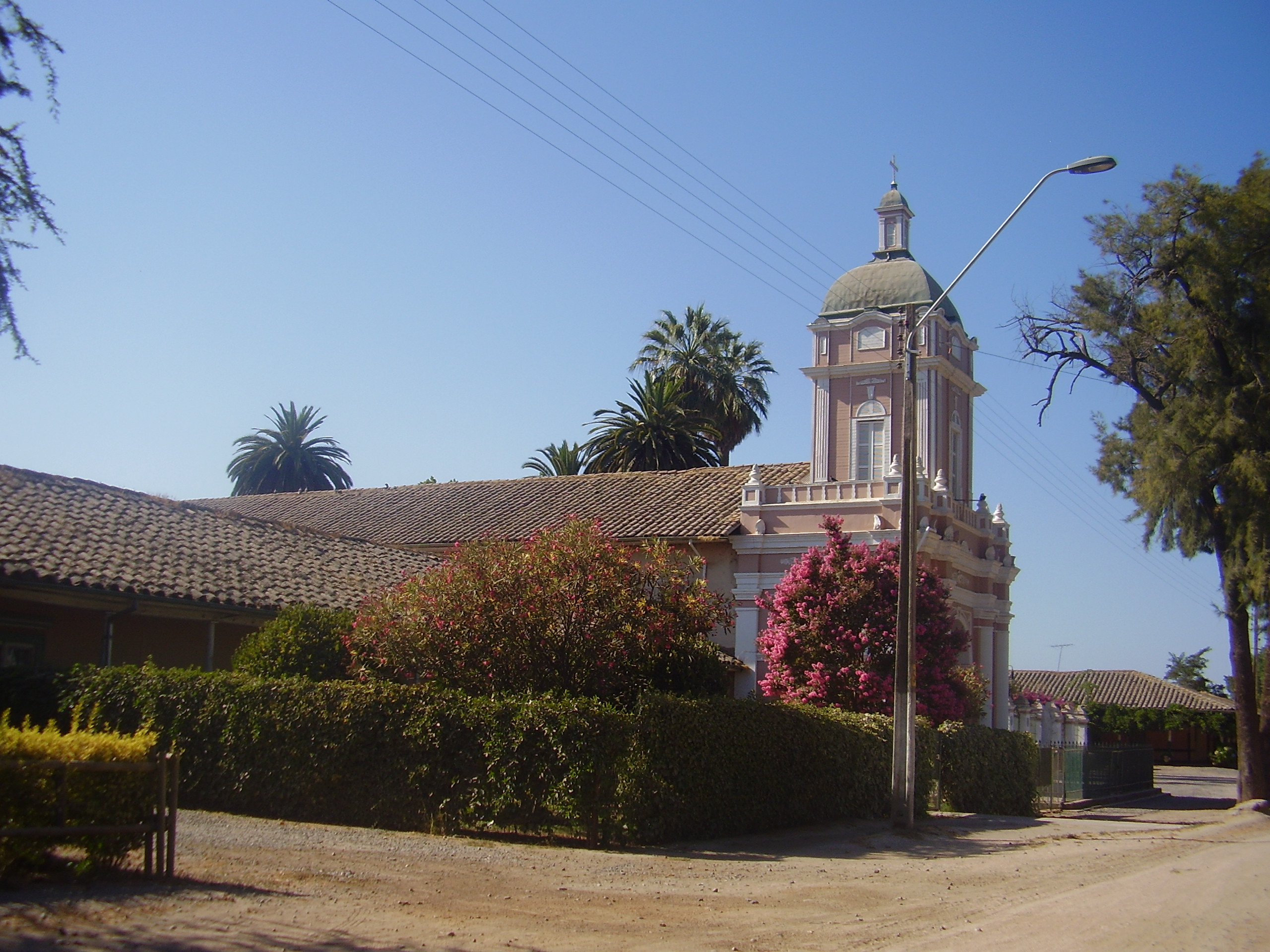 El museo San José del Carmen de El Huique se encuentra ubicado en la VI región del Libertador General Bernardo O’Higgins, en la Comuna de Palmilla a 56 kilómetros al poniente de la ciudad de San Fernando, capital de la provincia de Colchagua. Este valle fue una de las principales zonas agrícolas del país. La casa patronal de la antigua Hacienda San José del Carmen de El Huique, actual museo, es el único testimonio vivo de la época en donde estas grandes haciendas funcionaban como núcleo de centro productivos y económicos del país, conservando todo su mobiliario original, tradiciones y costumbres. This is a photo of a national monument in Chile: 634